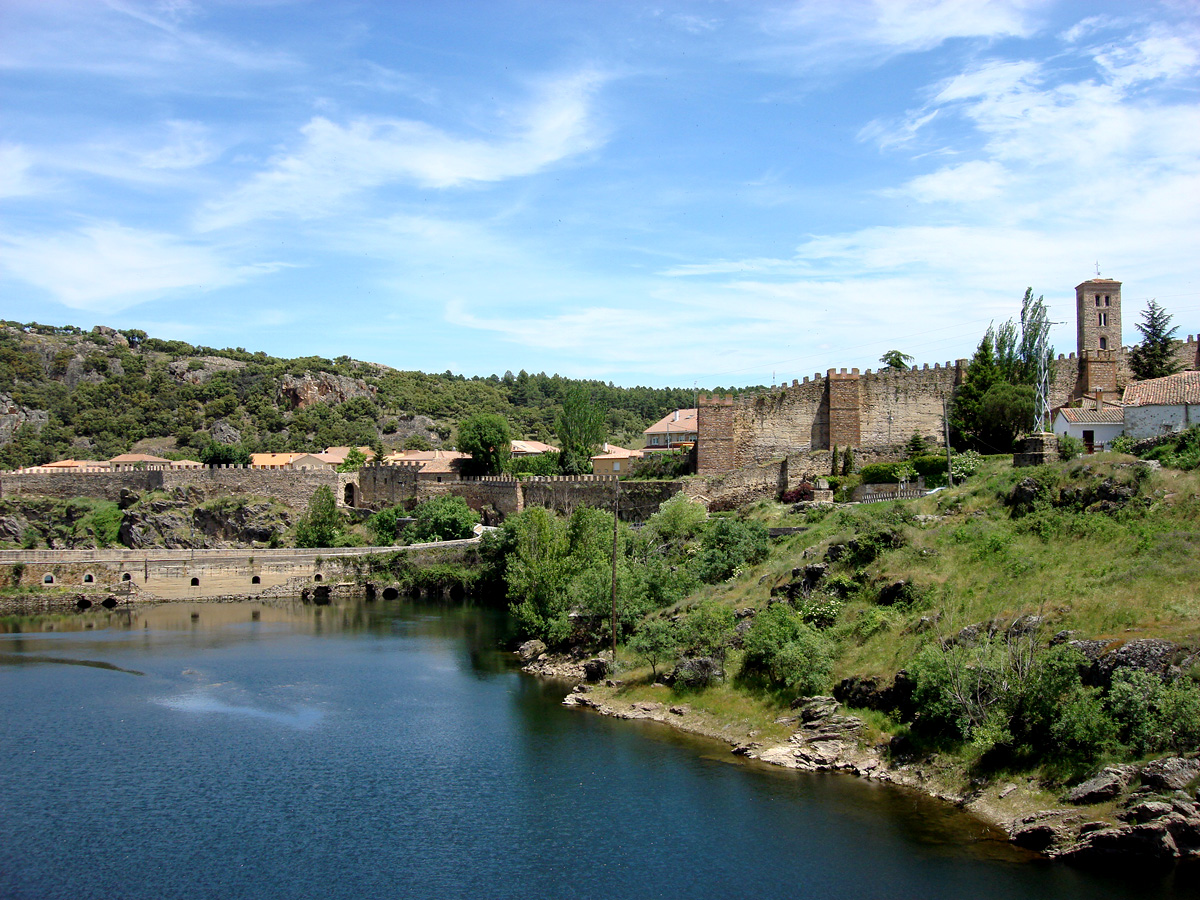 Buitrago ocupa una posición estratégica en la Sierra Norte madrileña, controlando la vía natural que comunica ambas mesetas a través del Puerto de Somosierra, único paso que permite atravesar con facilidad esta parte del Sistema Central.